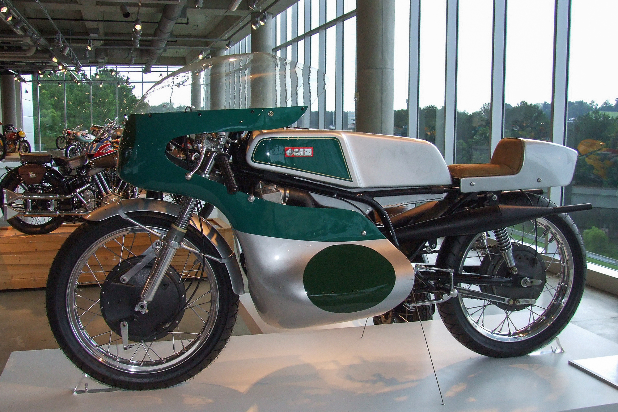 MZ 250 GP (1964) im Barber Vintage Motorsports Museum, Birmingham Alabama USA